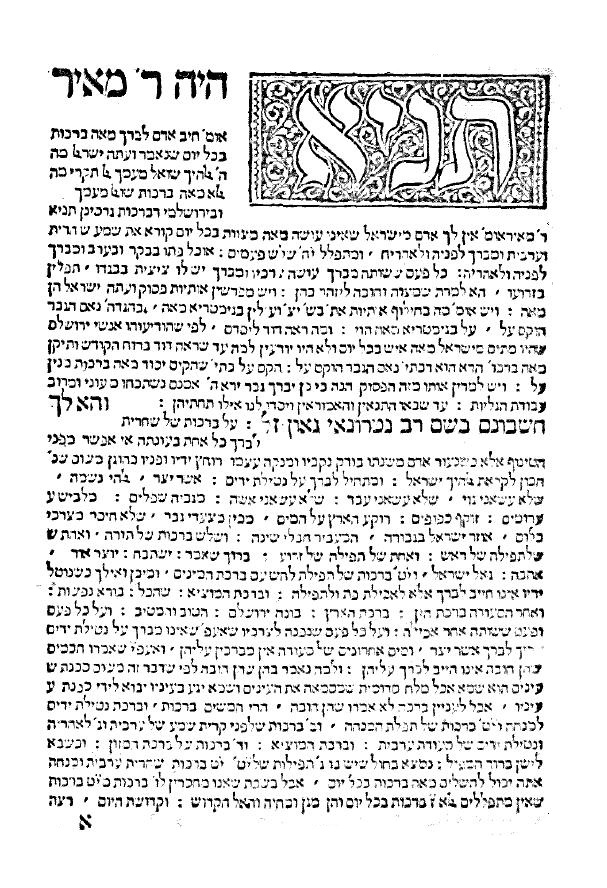 הדף הראשון במהדורת מנטובה ה'רע"ד (1514) של הספר. המילה תניא מודגשת ומעוטרת